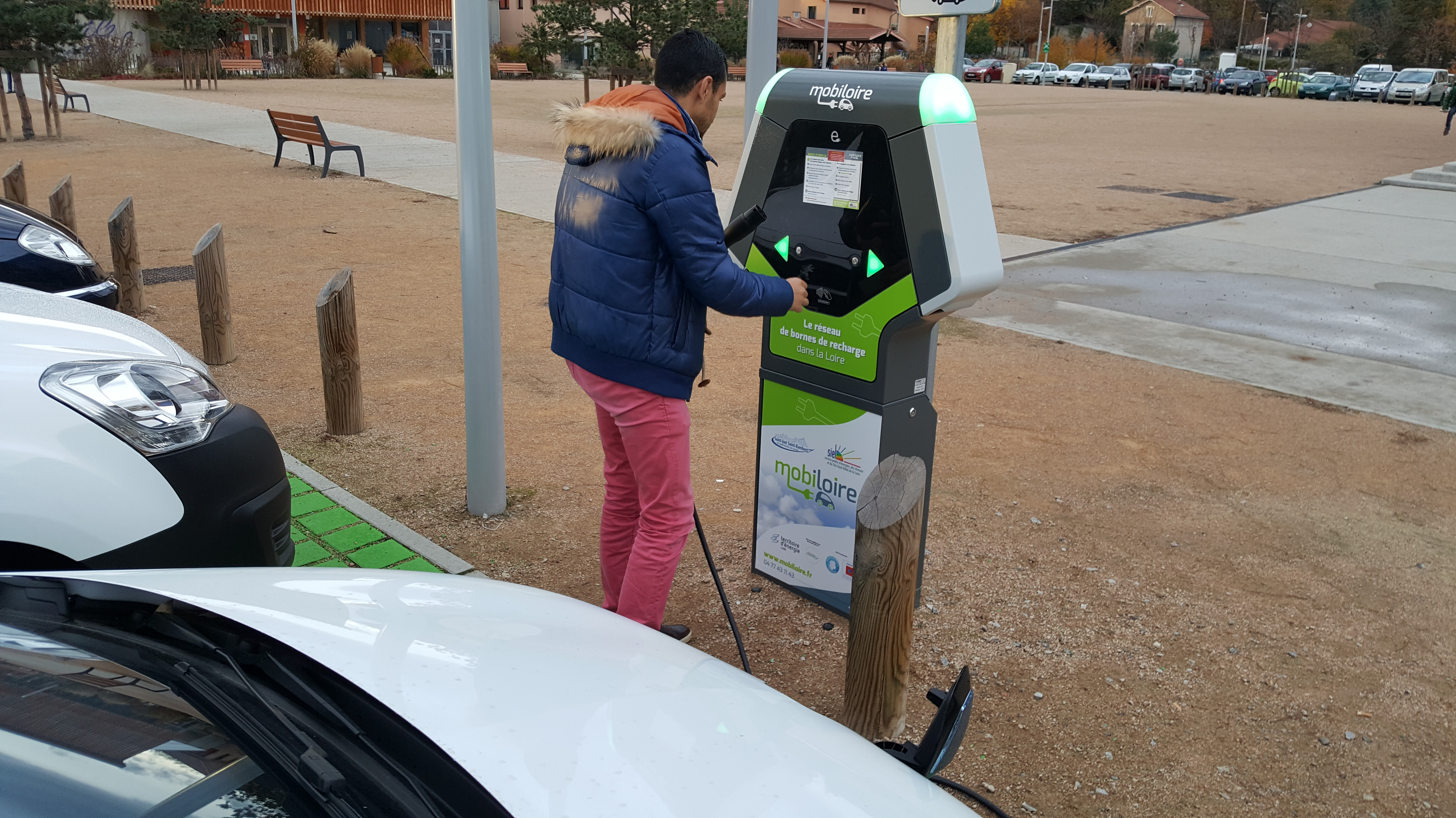 Borne de recharge pour véhicules électriques